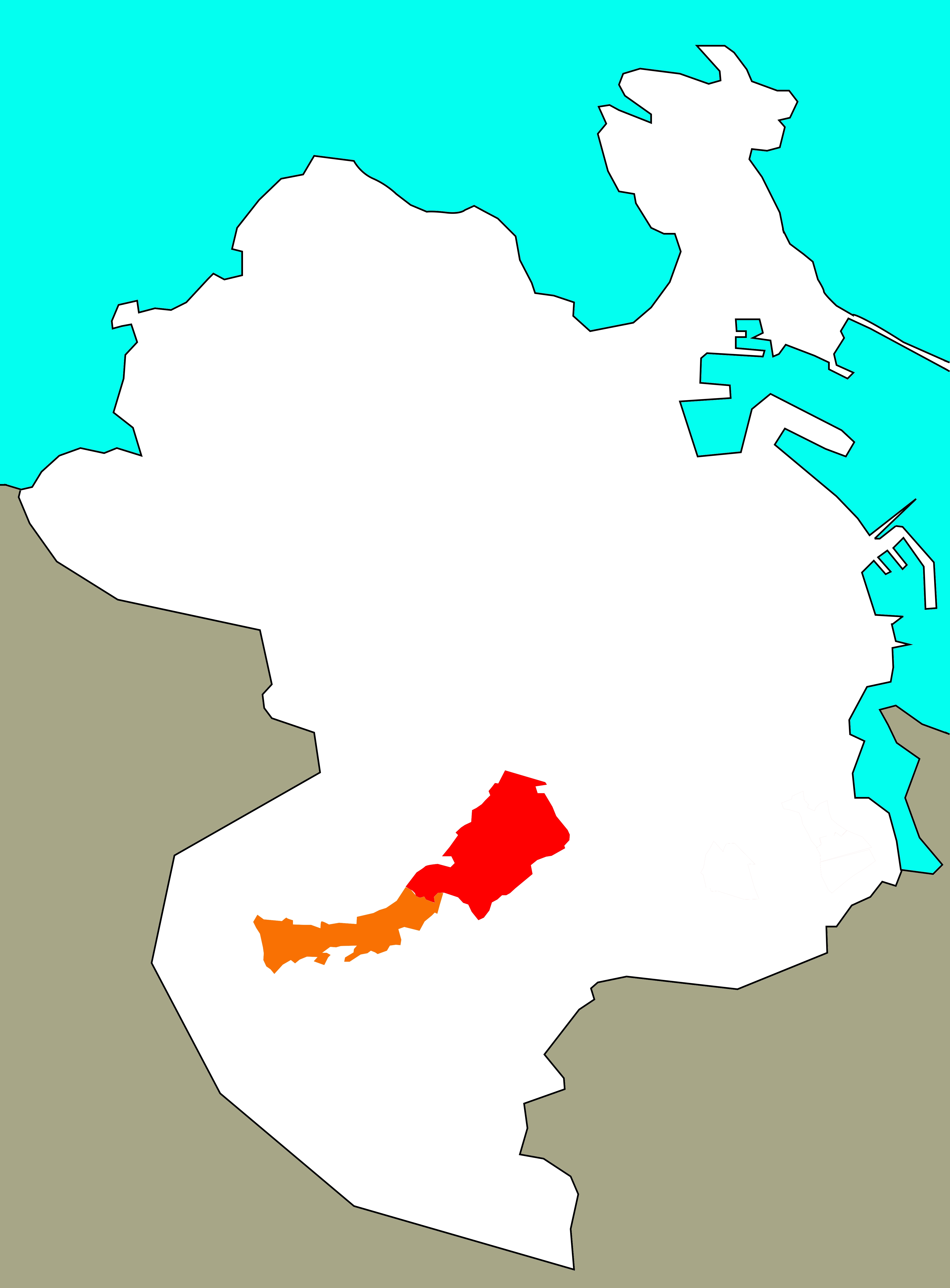 Situación de Mesoiro (vermello) e Novo Mesoiro (laranxa) no concello da Coruña, segundo